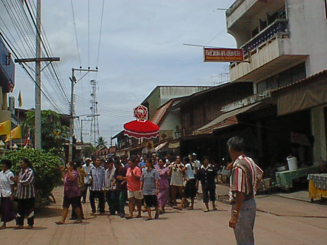 Parade in Bang Krathum, Bang Krathum, Phitsanulok, Thailand